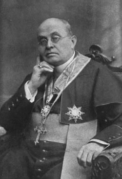 Jindřich Geisler